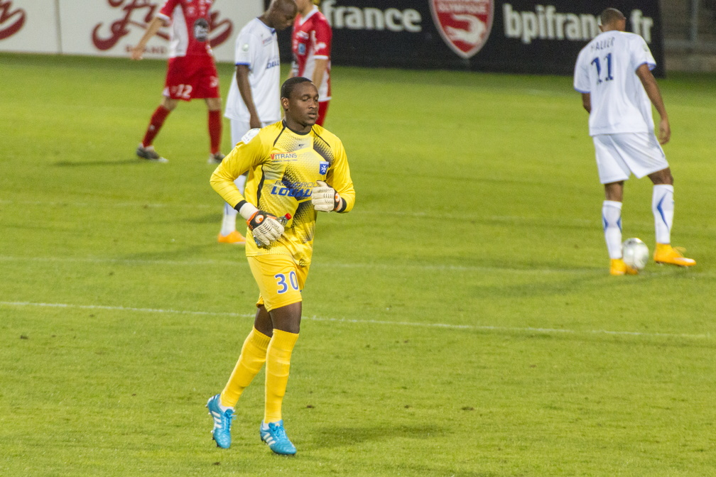 Donovan Léon durant le match Nîmes - AJ Auxerre